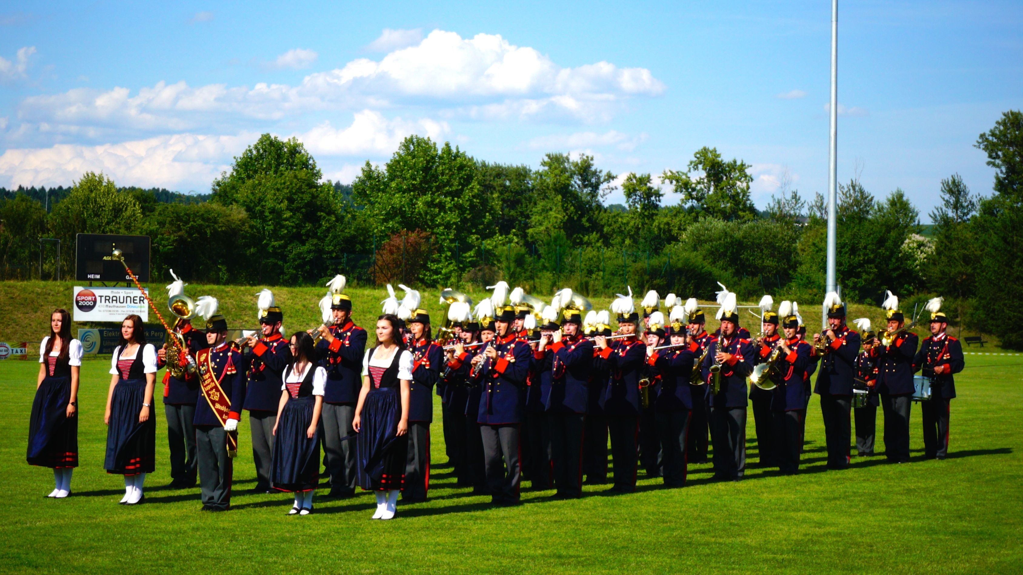 Lokale Musikkapelle mit Uniformen nach historischem Vorbild